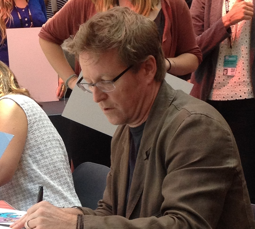 Andrew Stanton au festival international du film d'animation d'Annecy 2016